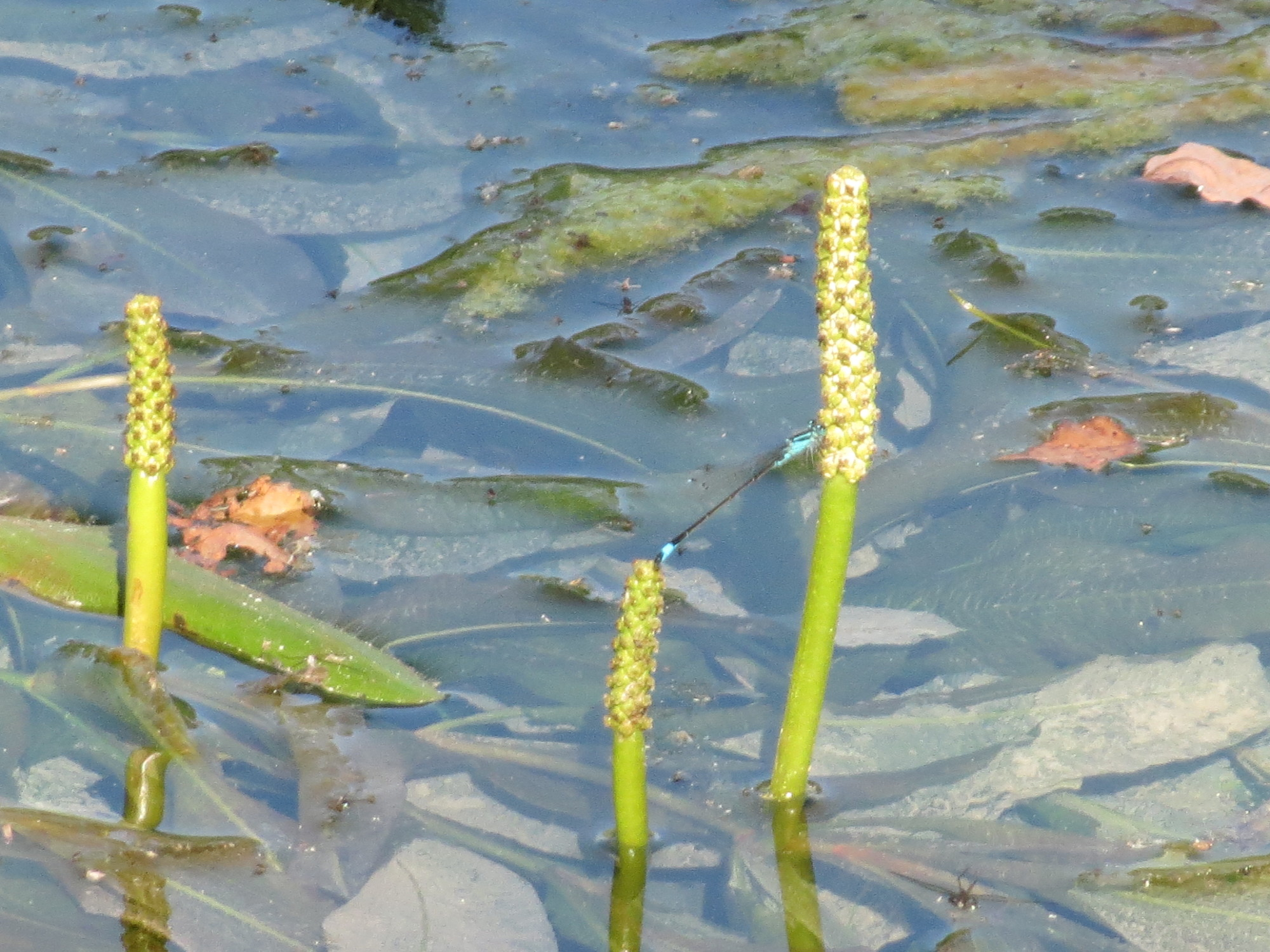 vermutlich Spiegelndes Laichkraut (Potamogeton lucens) im Reilinger Seee